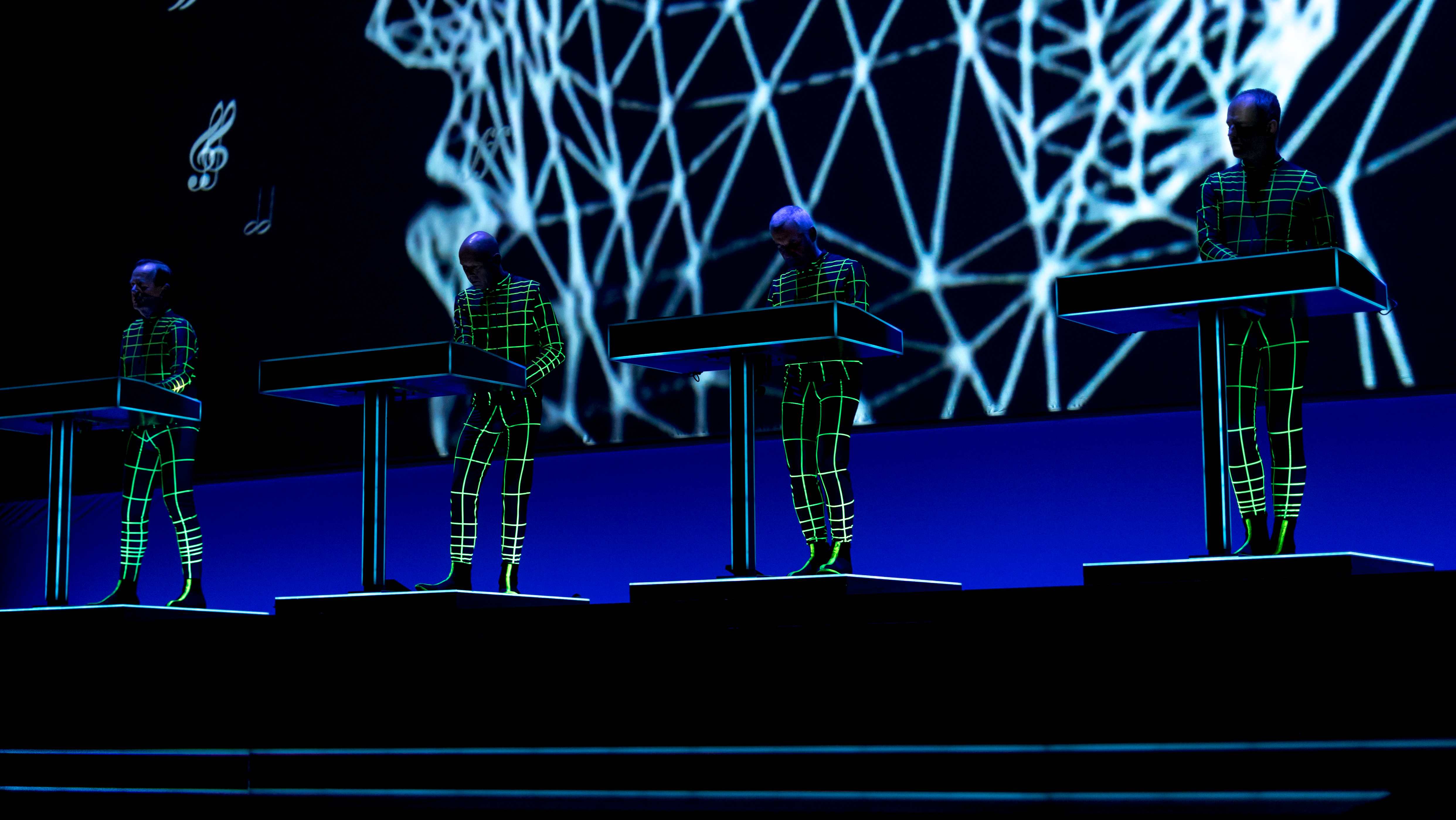 KraftwerkRAH210617-26